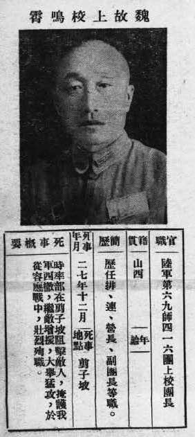 抗戰軍人忠烈錄第一輯中的烈士遺像